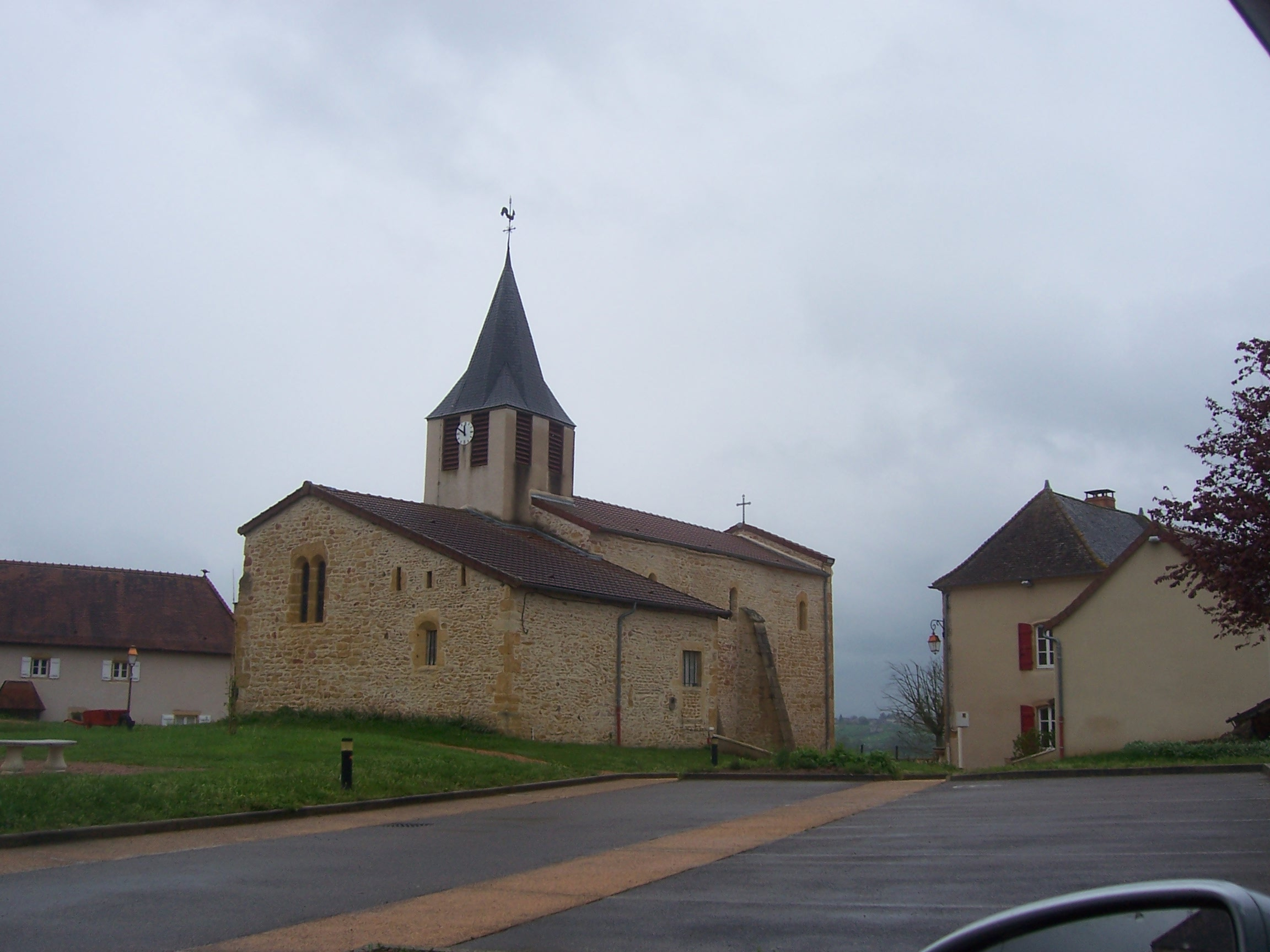 Eglise de Versaugues